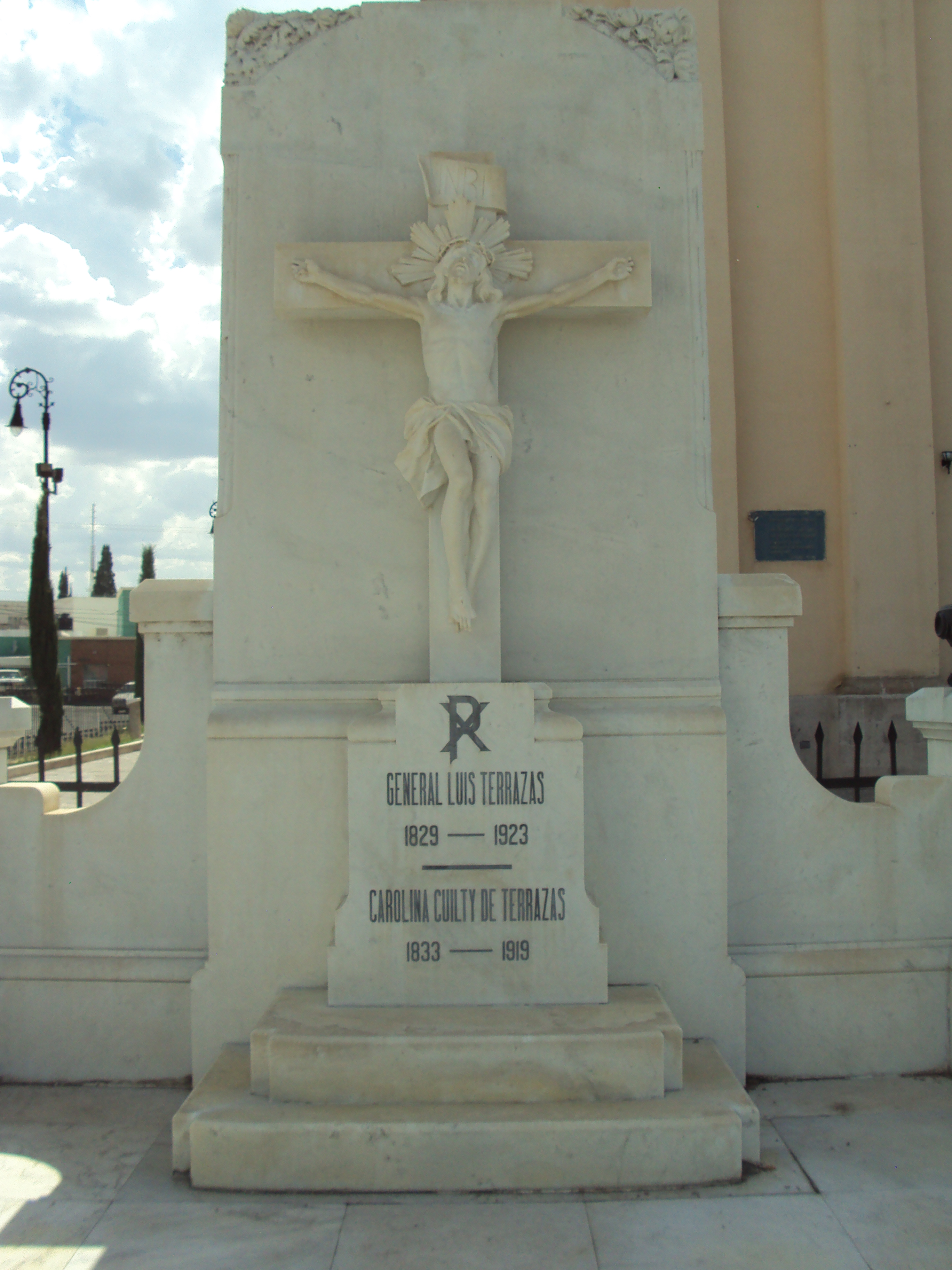 Sepulcro de en el atrio del Santuario de Guadalupe en Chihuahua, Chihuahua